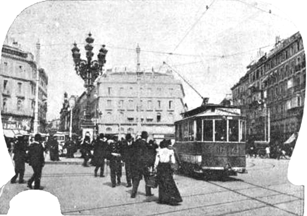 «O carro electrico de Madrid»